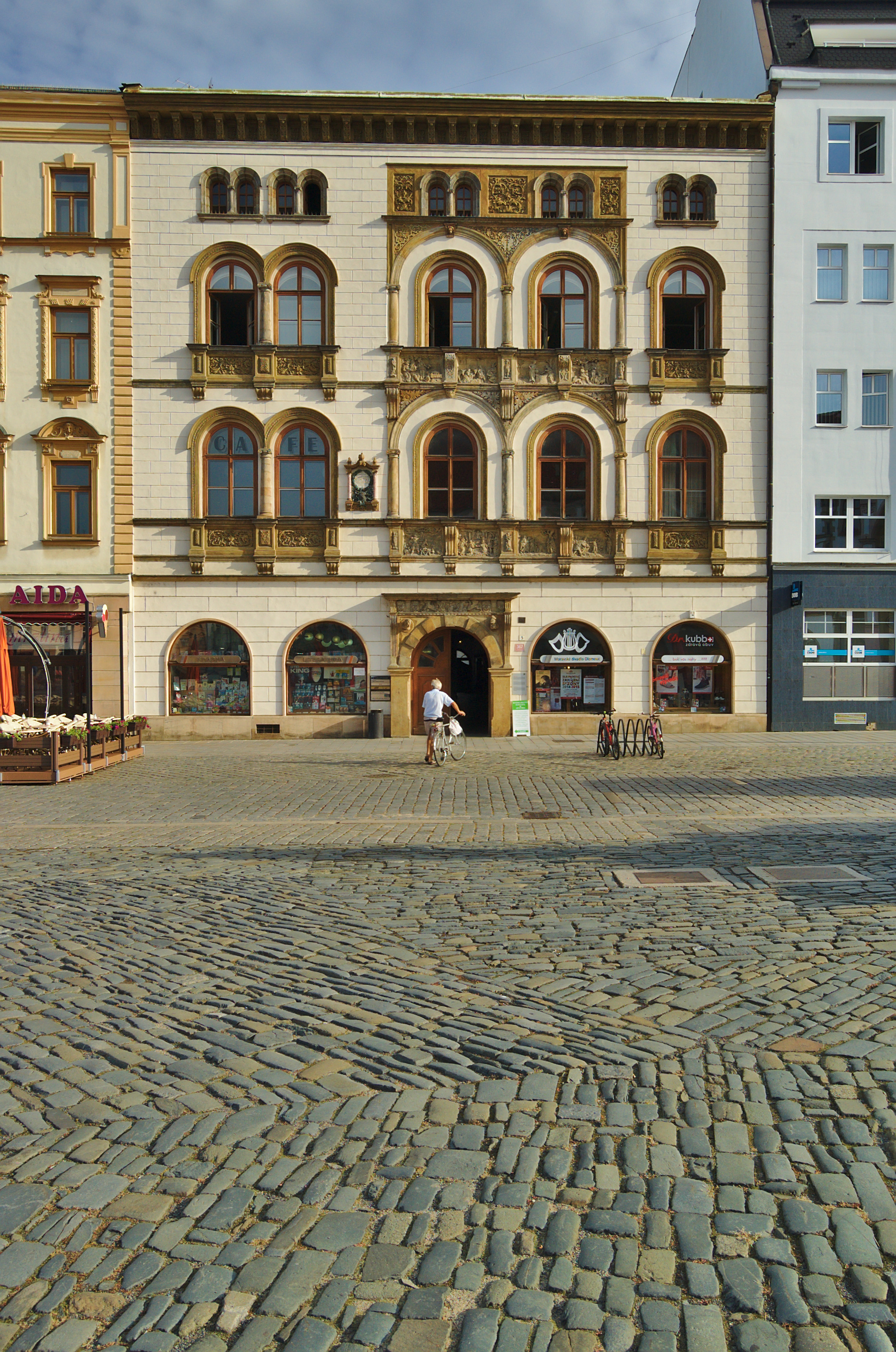 Edelmannův palác, čp. 371, Horní náměstí, a čp. 367, 8. května, Olomouc